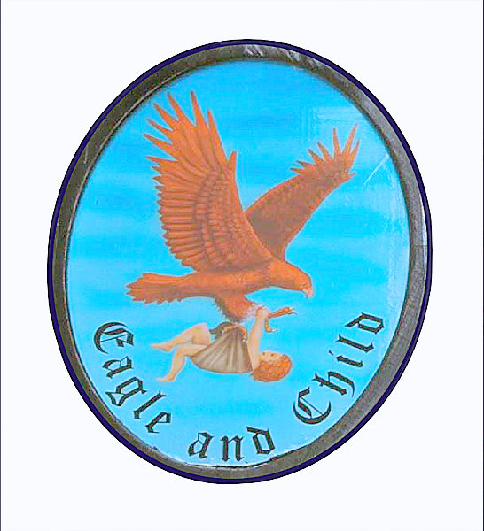 Enseigne Eagle and Child : image png retouchée, plus lumineuse, mise au format jpeg.